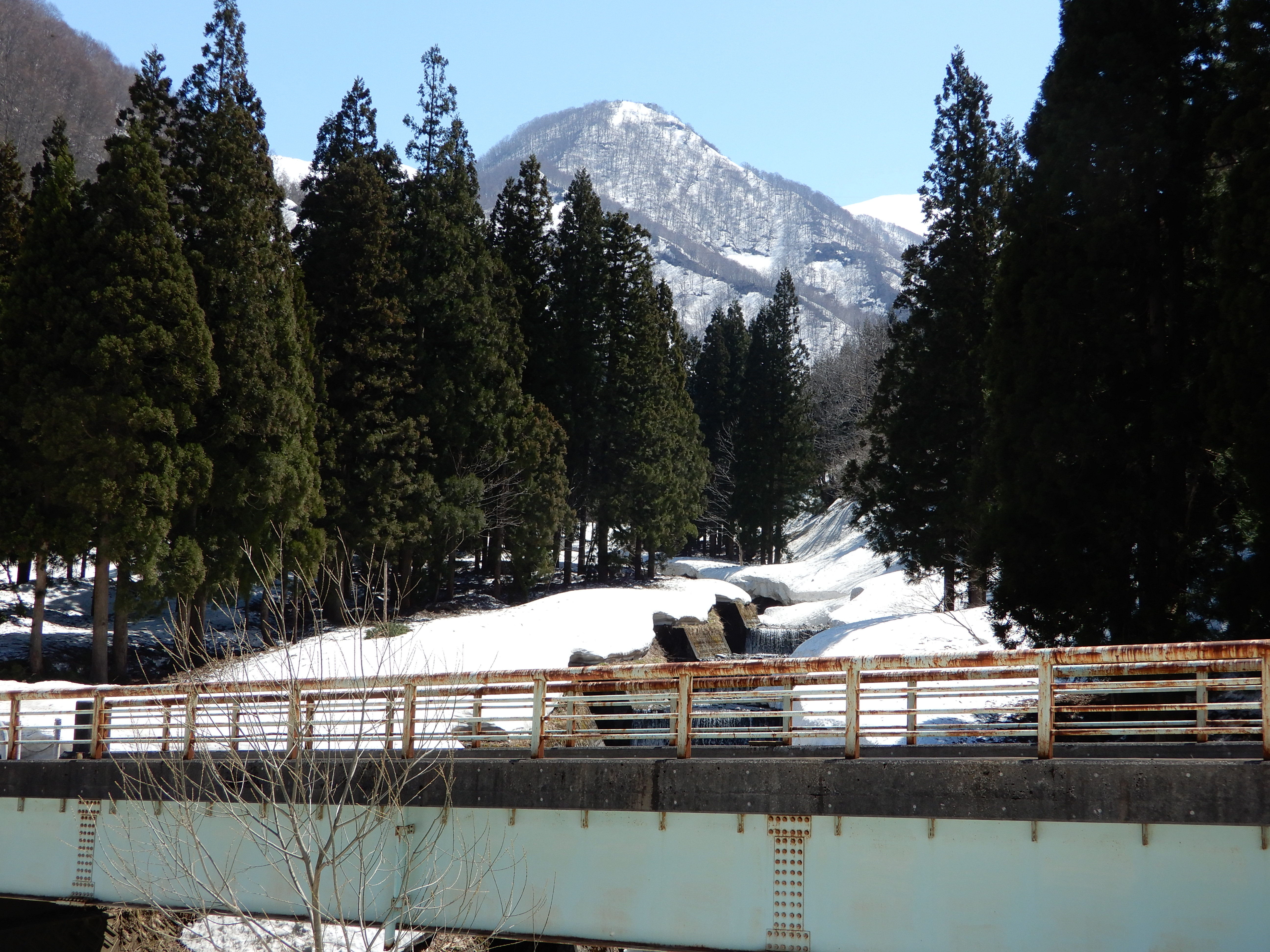 新柄沢橋より（2019-04-18）